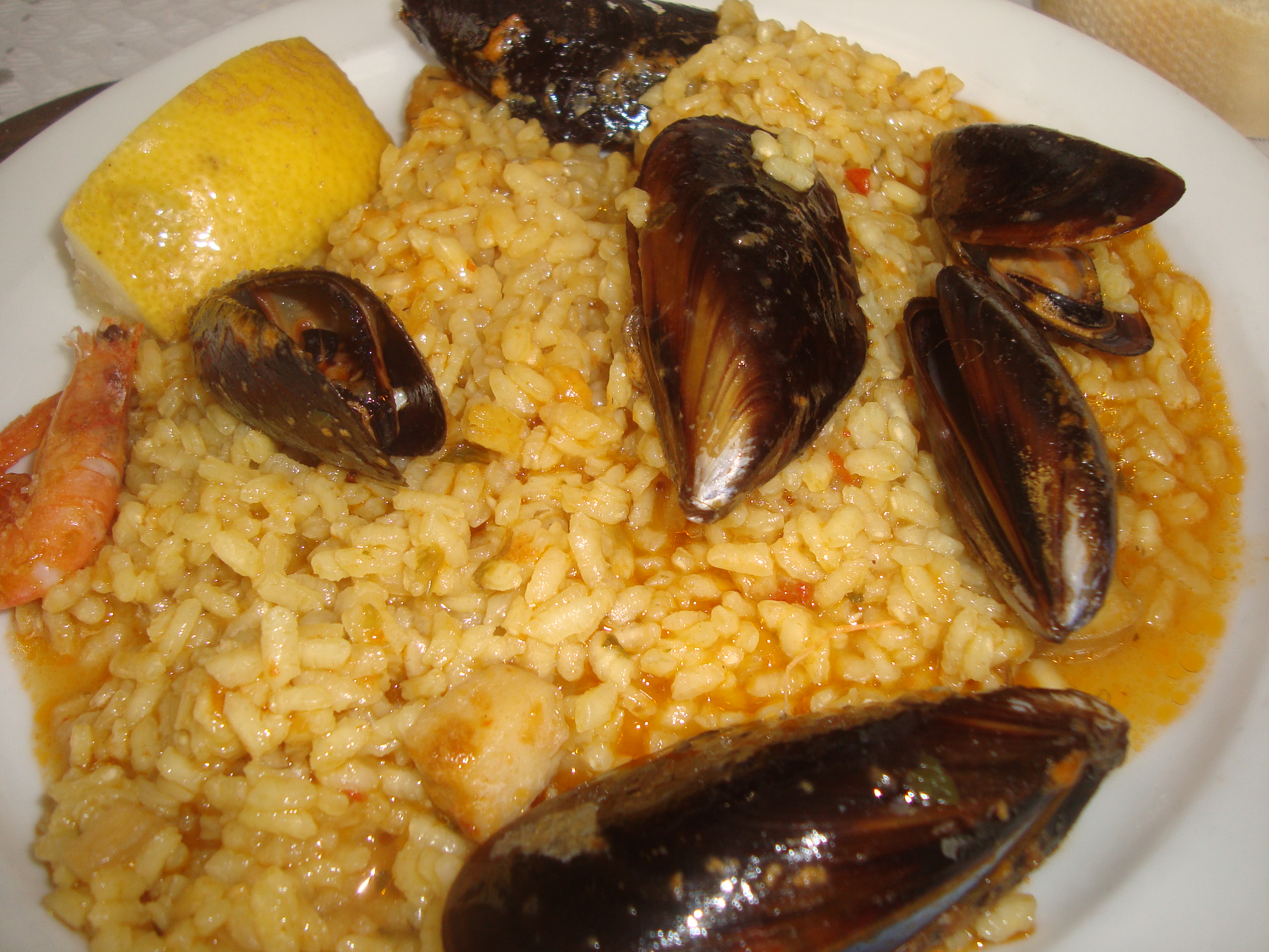 Arròs de peix a la cassola